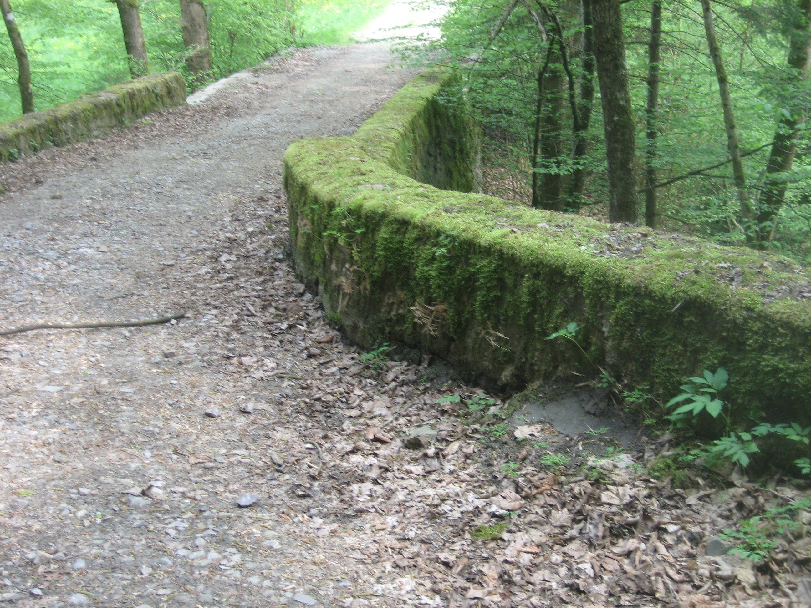 Altstraße und Brücke An der Schwarza